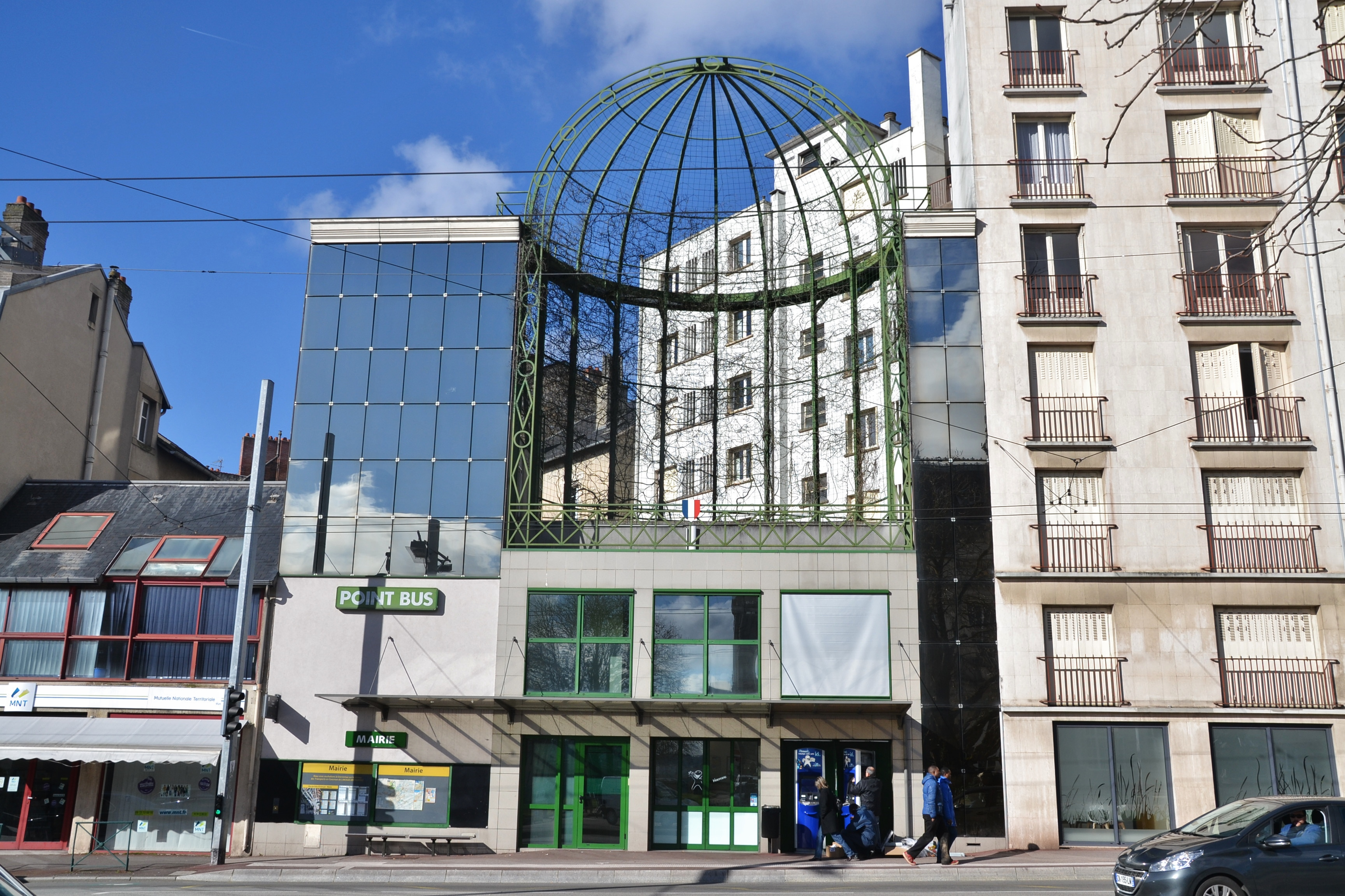 Le point bus de la STCL (Limoges; Haute-Vienne, France)